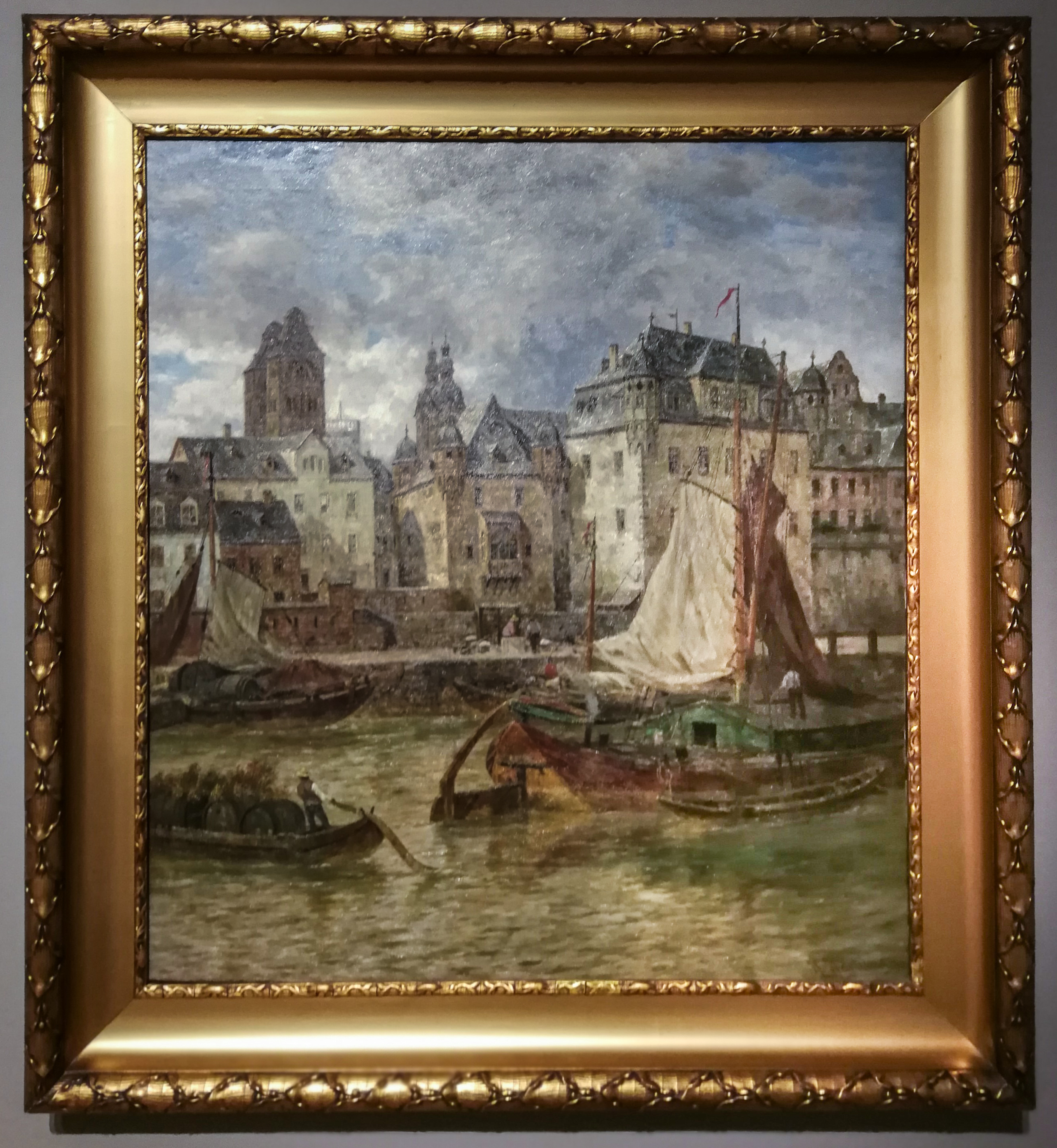 Heinrich Hartung III: Schöffenhaus und altes Kaufhaus in Koblenz, 1916 (Mittelrhein-Museum Koblenz)